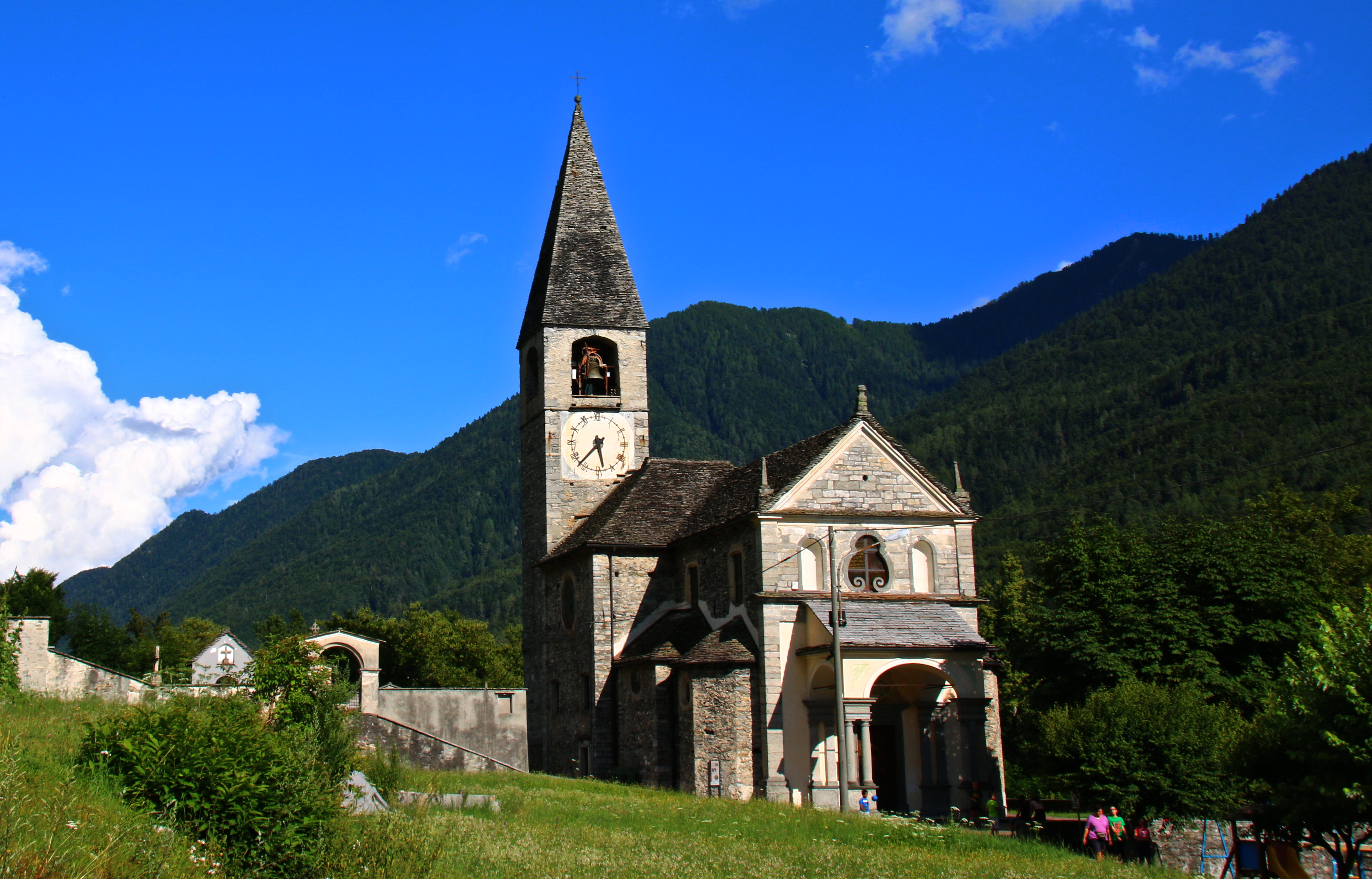 Chiesa di sant'Ambrogio a Coimo, frazione del comune di Druogno in provincia del Verbano-Cusio-Ossola